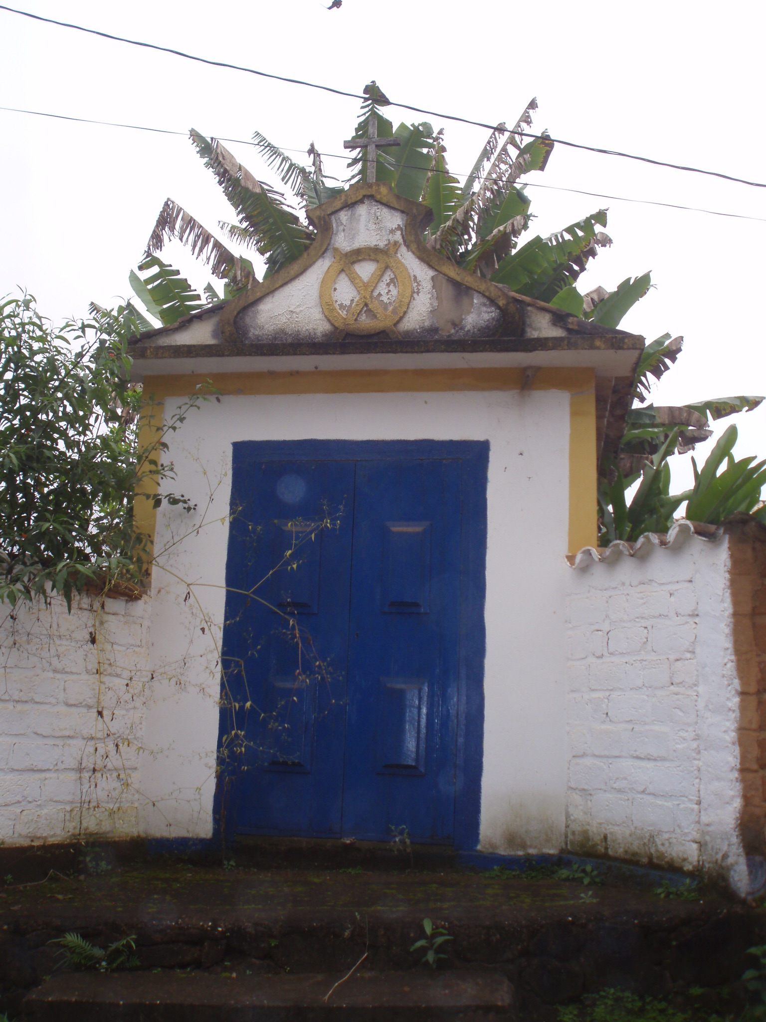 Pequeno oratório no distrito de Bichinho